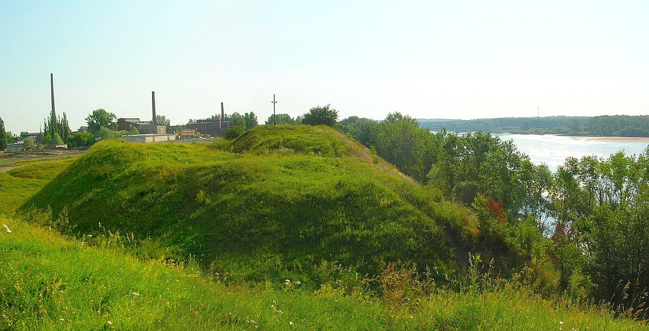 Grodzisko Wyszogród w Bydgoszczy - widok z południowego-zachodu